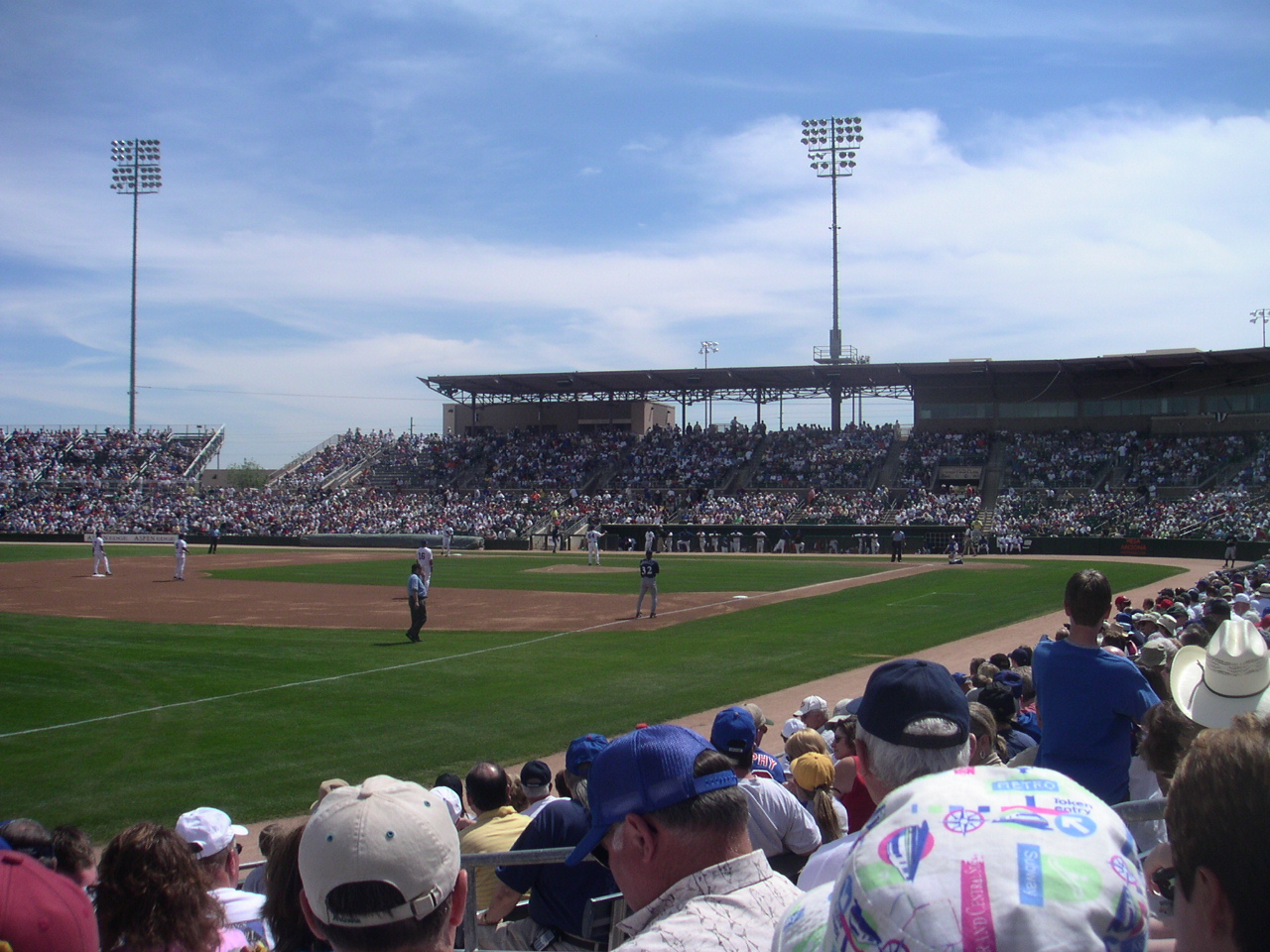 HoHoKam Park in Mesa, Arizona -- March 2005